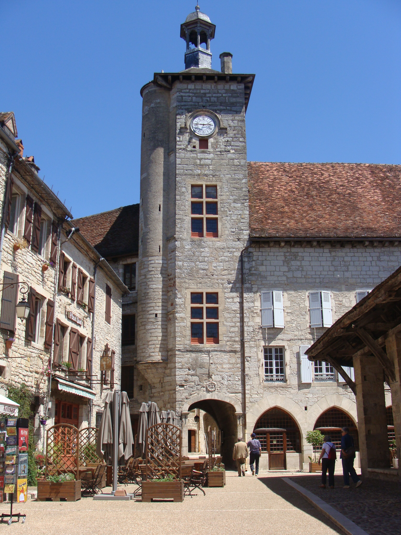 Beffroi du Palais de la Raymondie à Martel, Lot - France. Les 2 fenêtres à meneaux du Moyen-Âge furent modifiées durant la guerre de 100 ans pour renforcer le caractère défensif du bâtiment. Elles ont été restaurées à l'identique en 2012.